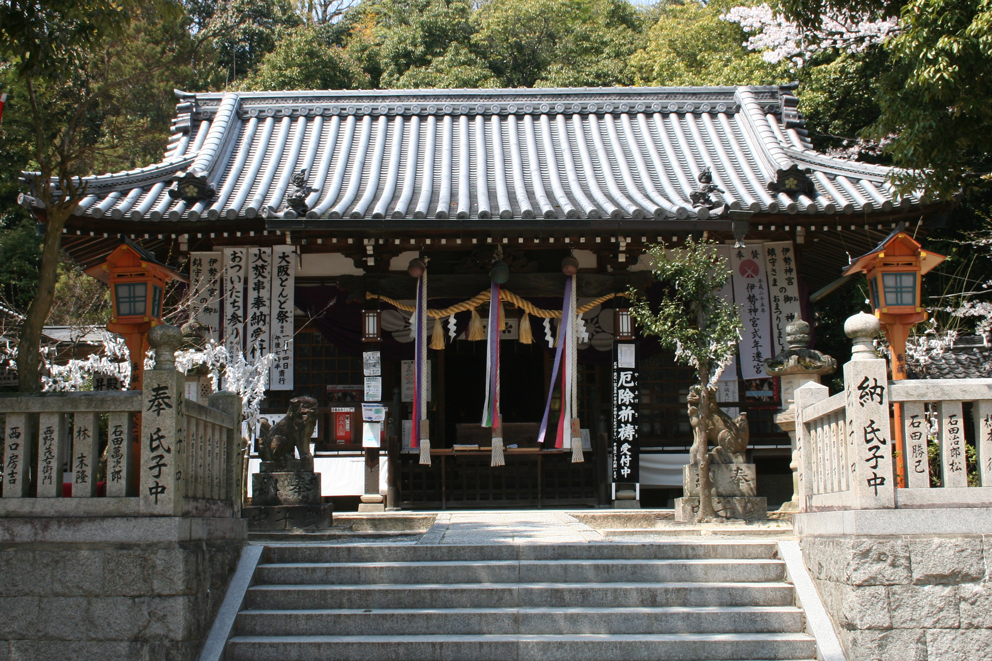 上新田天神社拝殿（大阪府豊中市）